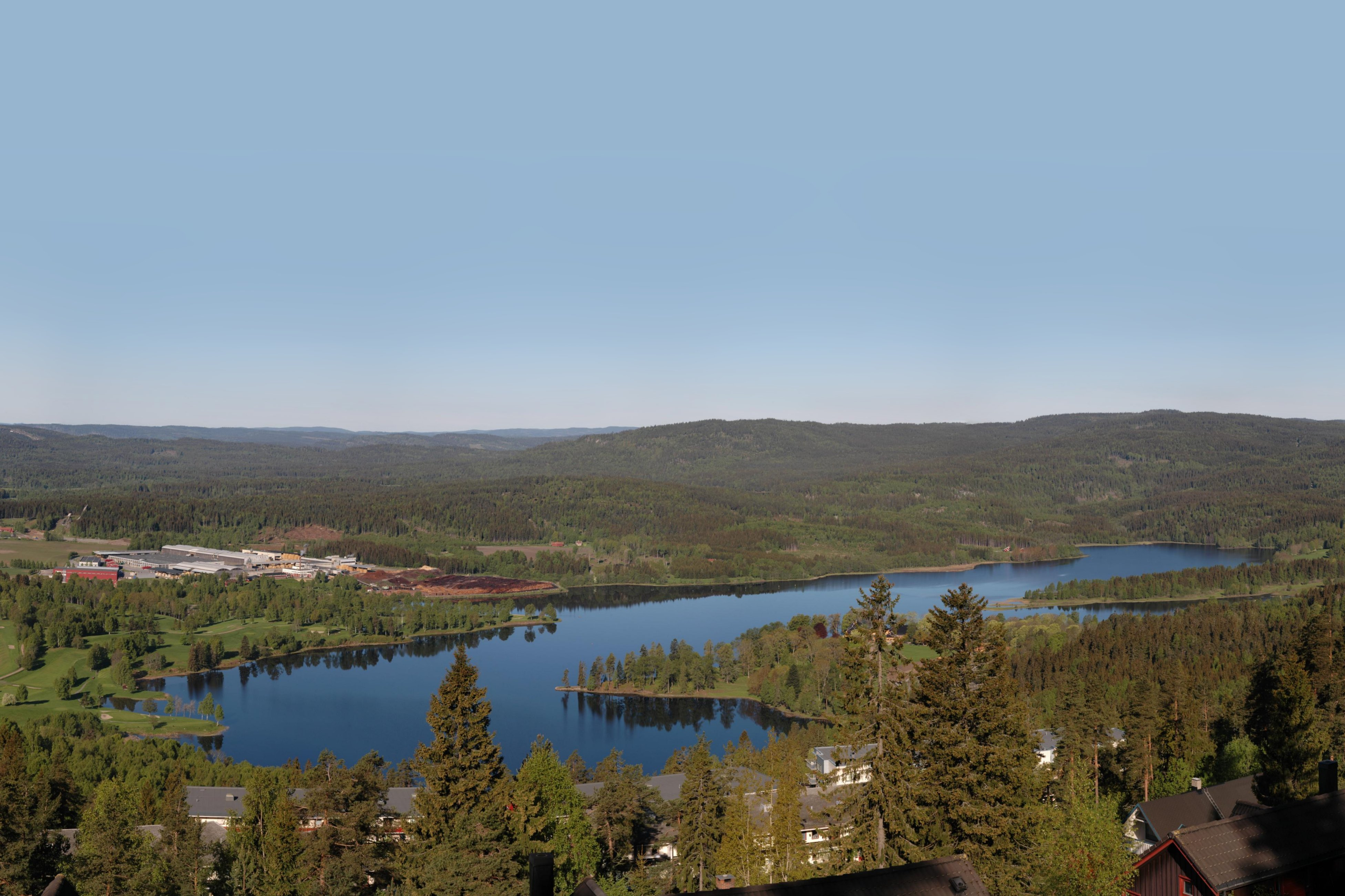 Bogstadvannet, Oslo/Bærum, Norway seen from Voksenlia.